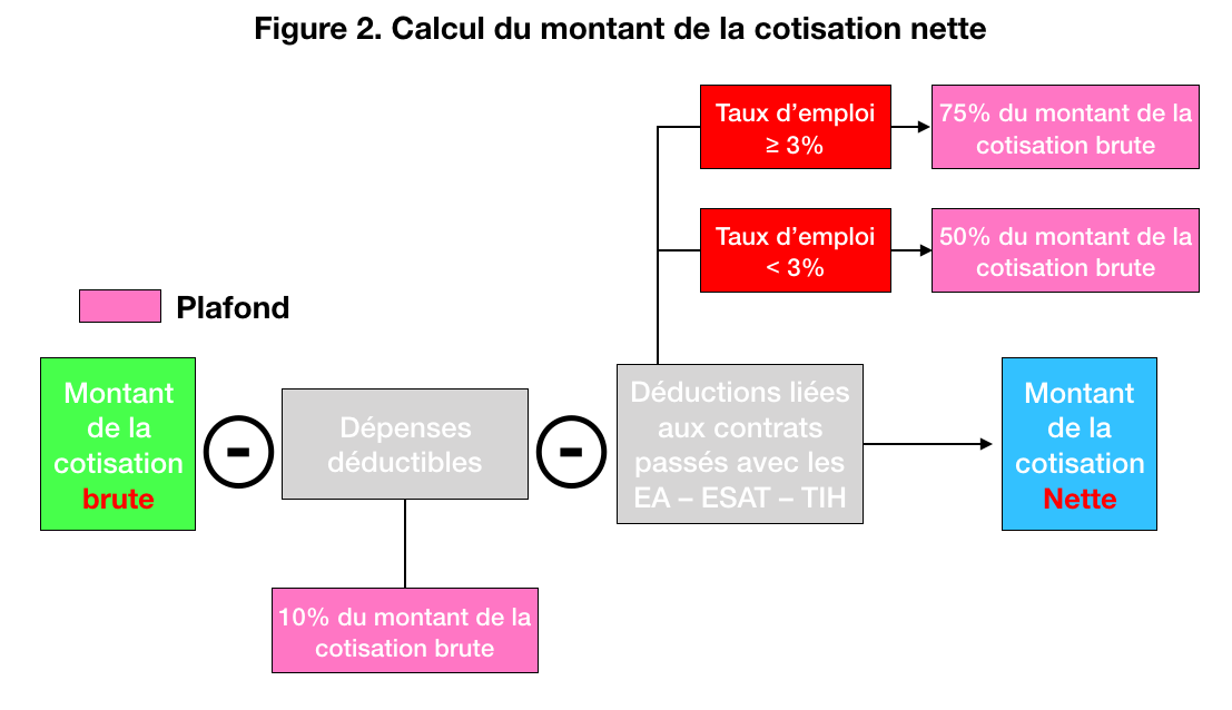 Vulgarisation du nouveau mode de calcul de la cotisation "nette" dans le cadre de l'Obligation d'Emploi des Travailleurs Handicapés (OETH) en France.